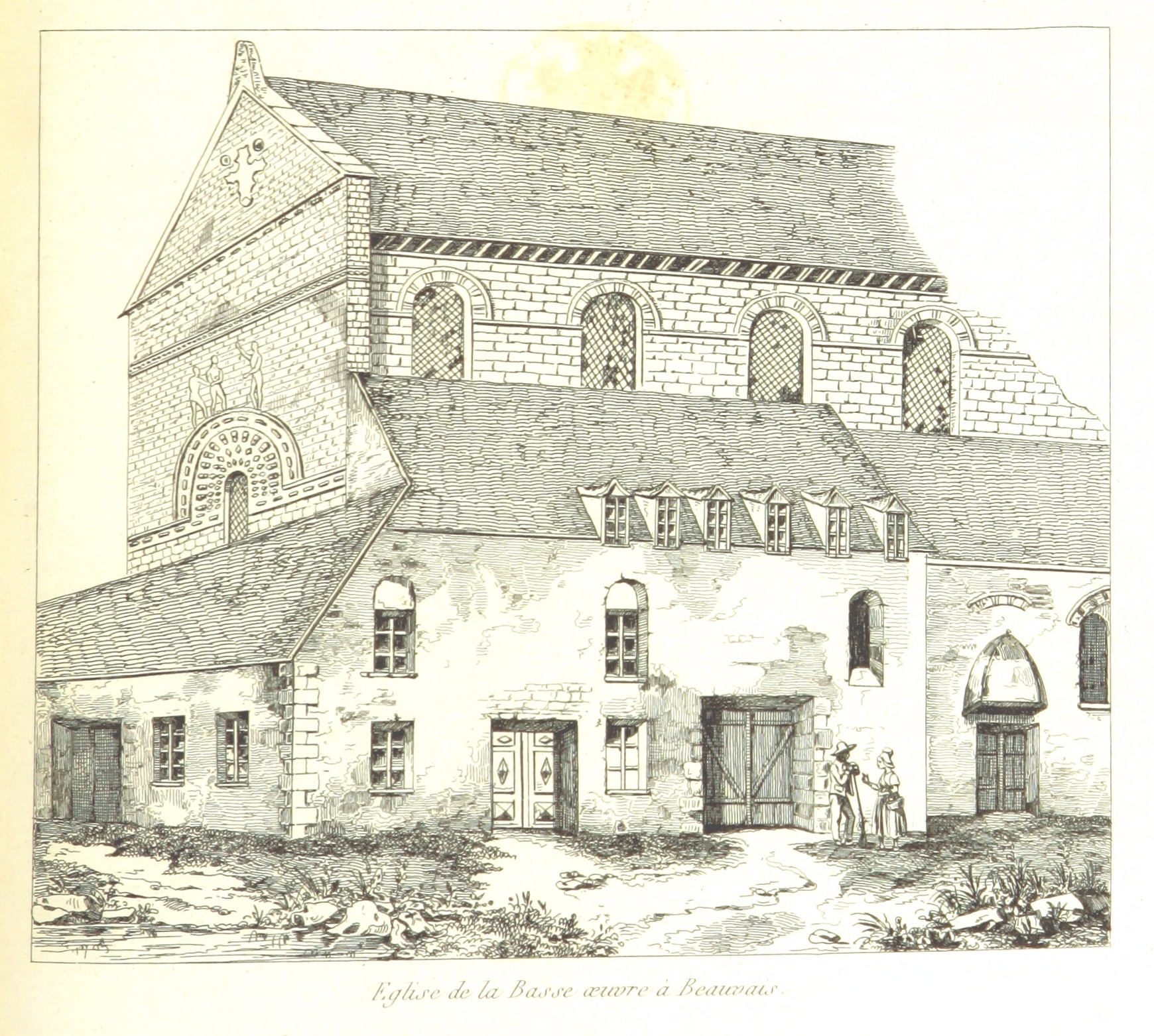 L'église de la Basse-Oeuvre à Beauvais, telle que représentée dans "La France historique et monumentale" de Jean-Abel Hugo, 1836